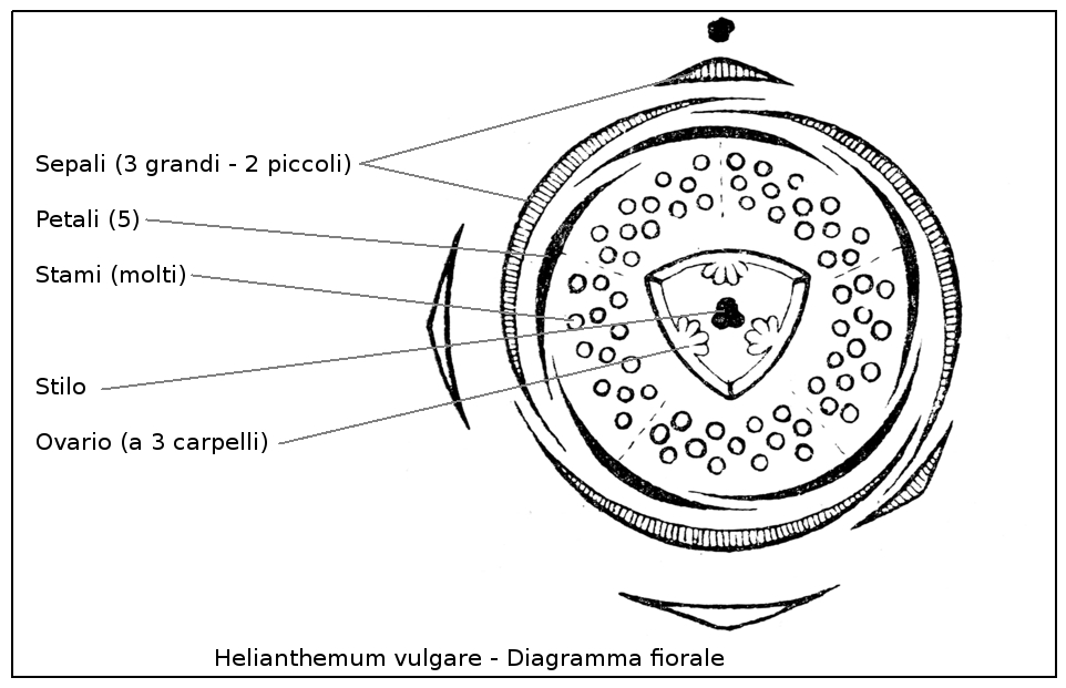 Flower diagram of Helianthemum vulgare